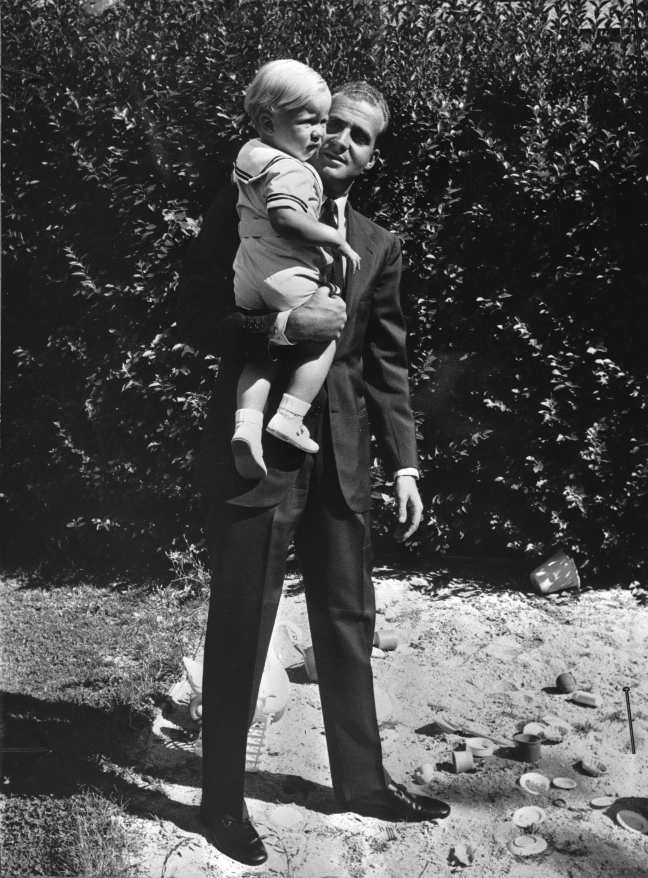 Collectie / Archief : Fotocollectie Anefo Reportage / Serie : Nieuwe opnamen van Prins Juan Carlos (Prins van Spanje) en familie Beschrijving : Prins Juan Carlos met zijn zoontje Prins Felipe Datum : 1 augustus 1969 Locatie : Spanje Trefwoorden : prinsen Persoonsnaam : Felipe, prins van Spanje, Juan Carlos, prins van Spanje Fotograaf : [onbekend] Auteursrechthebbende : Nationaal Archief Materiaalsoort : Negatief (zwart/wit) Nummer archiefinventaris : bekijk toegang 2.24.01.04 Bestanddeelnummer : 922-6782